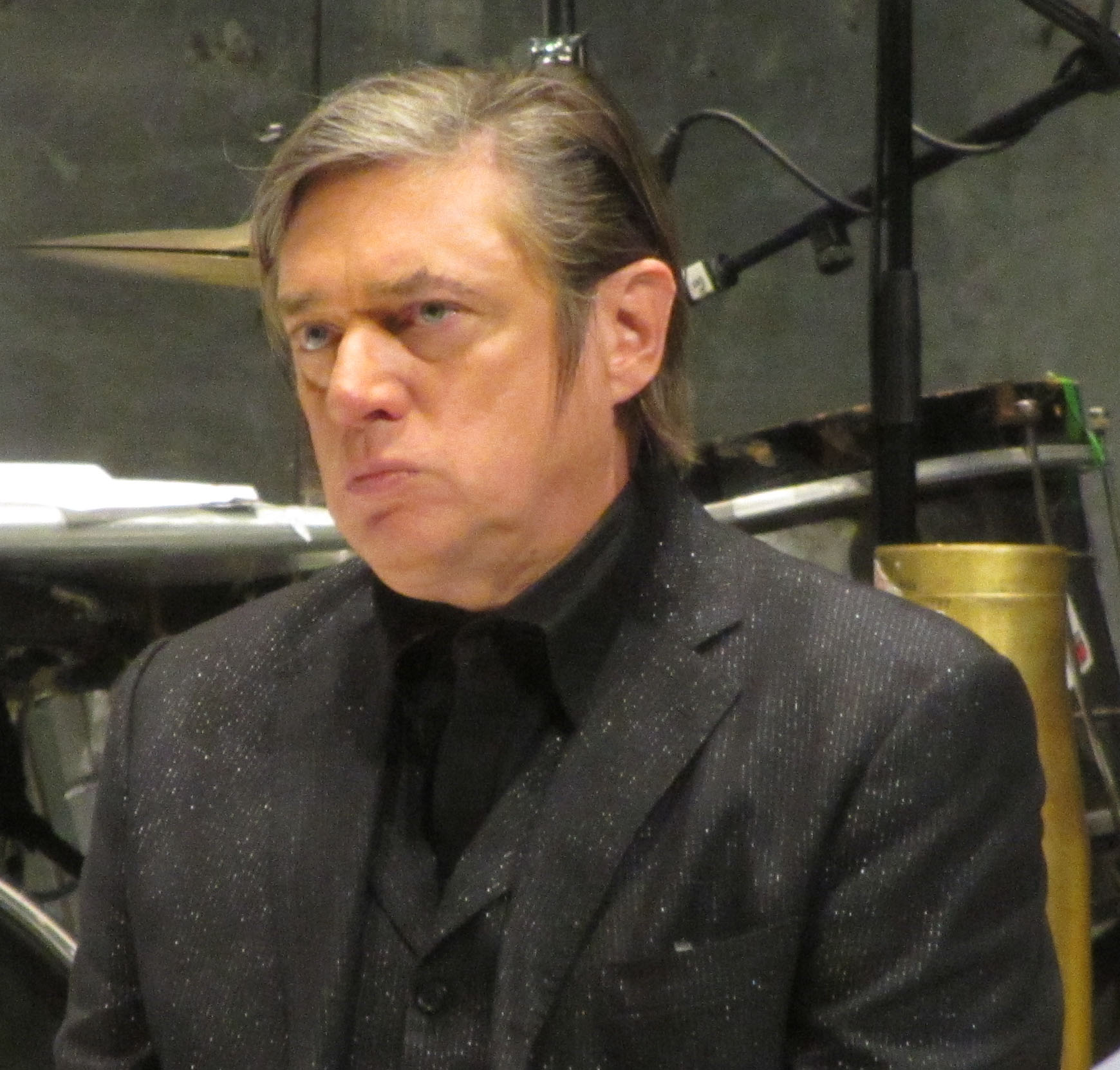 Sänger Blixa Bargeld während eines Auftritts mit den Einstürzenden Neubauten im Theater im Pfalzbau in Ludwigshafen am Rhein